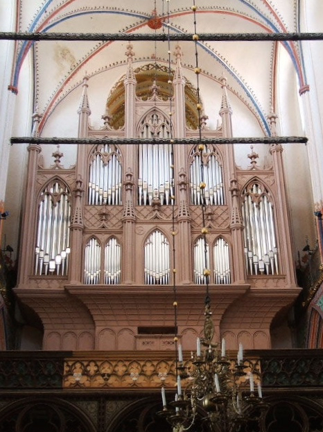 Stralsund, Buchholz-Orgel in der Nikolaikirche.